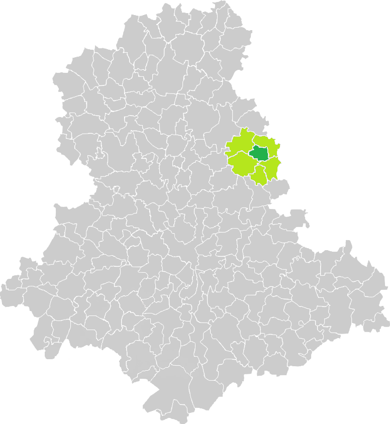 Carte de situation de la commune de Saint-Sulpice-Laurière (en vert foncé) dans le votre Canton (en vert clair) sur une carte des communes de la Haute-Vienne